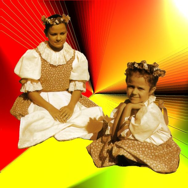 Obrázek jsem vytvořil pro esperantskou vikipedii. Nyní jsem ho použil zde. Ruza